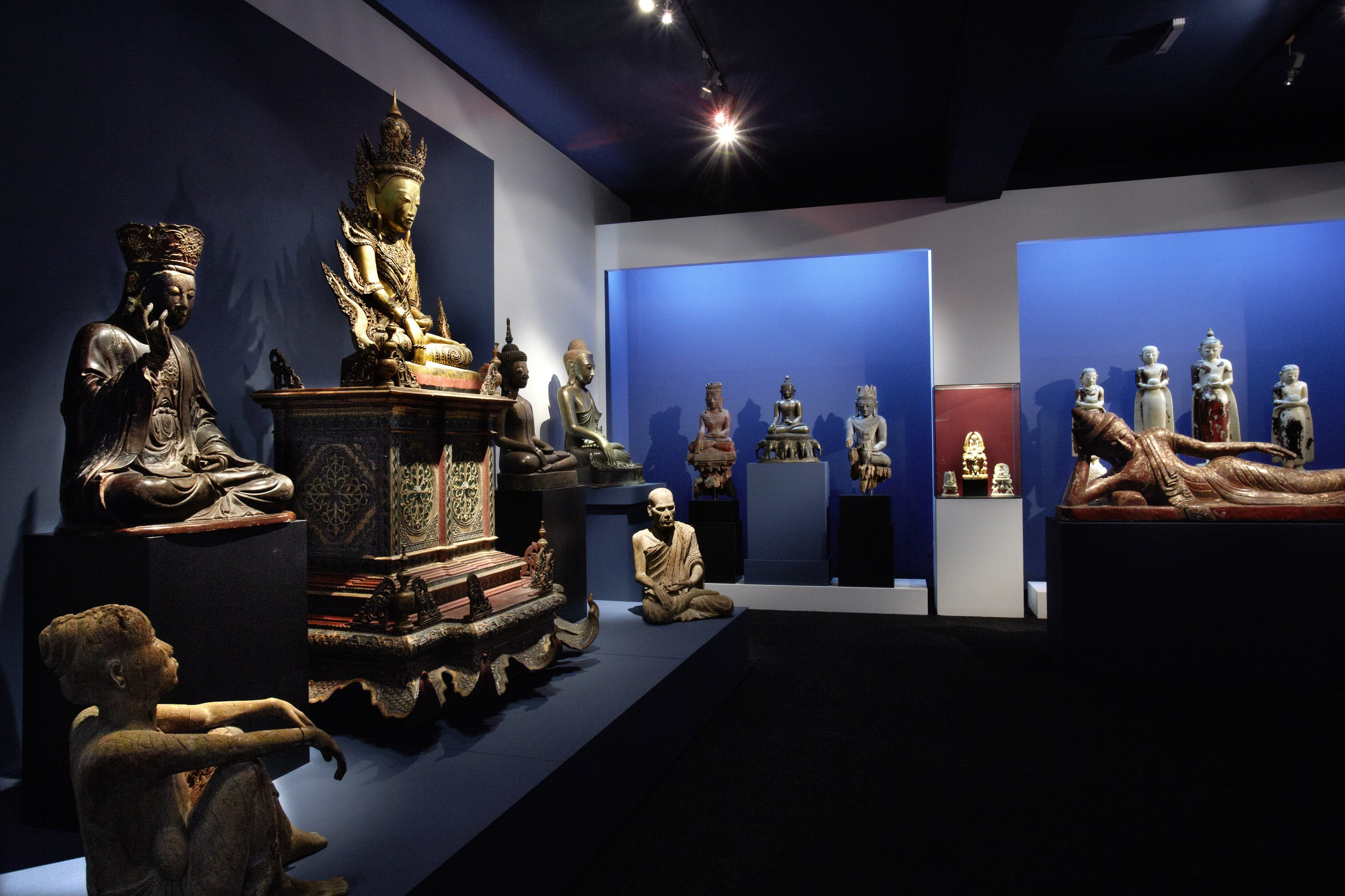 Das Museum der Völker in Schwaz präsentiert auf 1000 m2 fünf große Themenbereiche afrikanischer und asiatischer Kunst und Kultur.